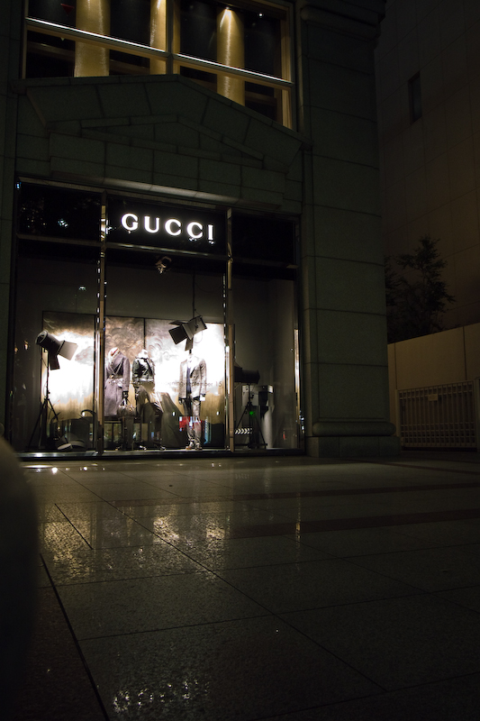 Gucci store